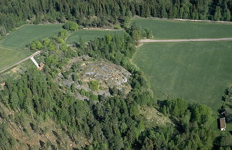 RAÄ-nummer Sköllersta 28:1. Åmehälla fornborg (Omhällaborg). Motiv: Sköllersta 28:1 Nyckelord: Flygbilder, Riksintressen Kategori: Skogslandskap, Fornborg RAÄ-nummer Sköllersta 28:1. Åmehälla fornborg (Omhällaborg). Sköllersta 28:1.